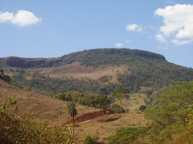 O Monte Cristal é o ponto mais alto da cidade de Santo Antônio do Rio Abaixo e Conceição do Mato Dentro, com 2000 mts.